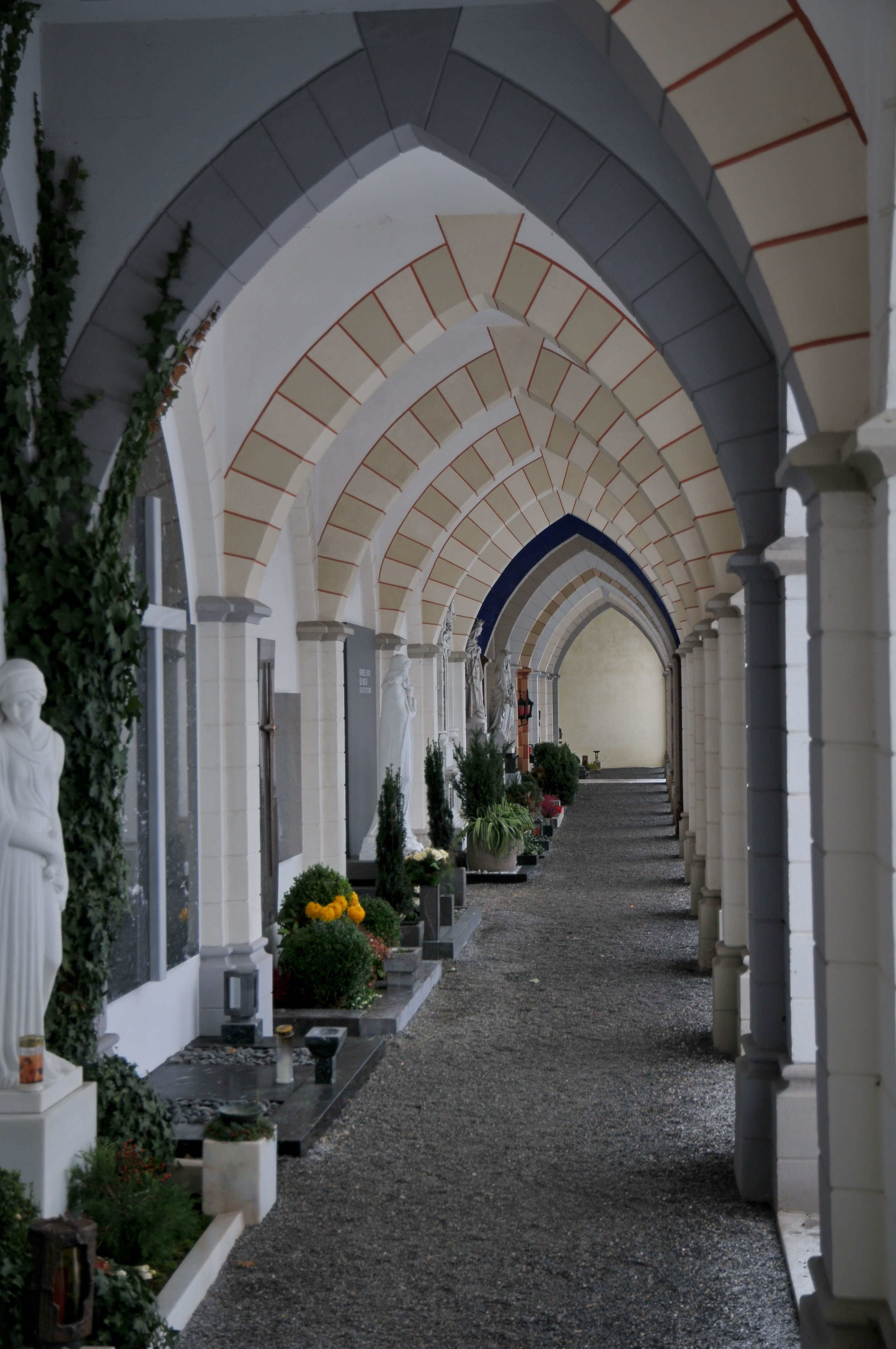 Friedhof St. Michael auf dem Liebfrauenberg in Rankweil.